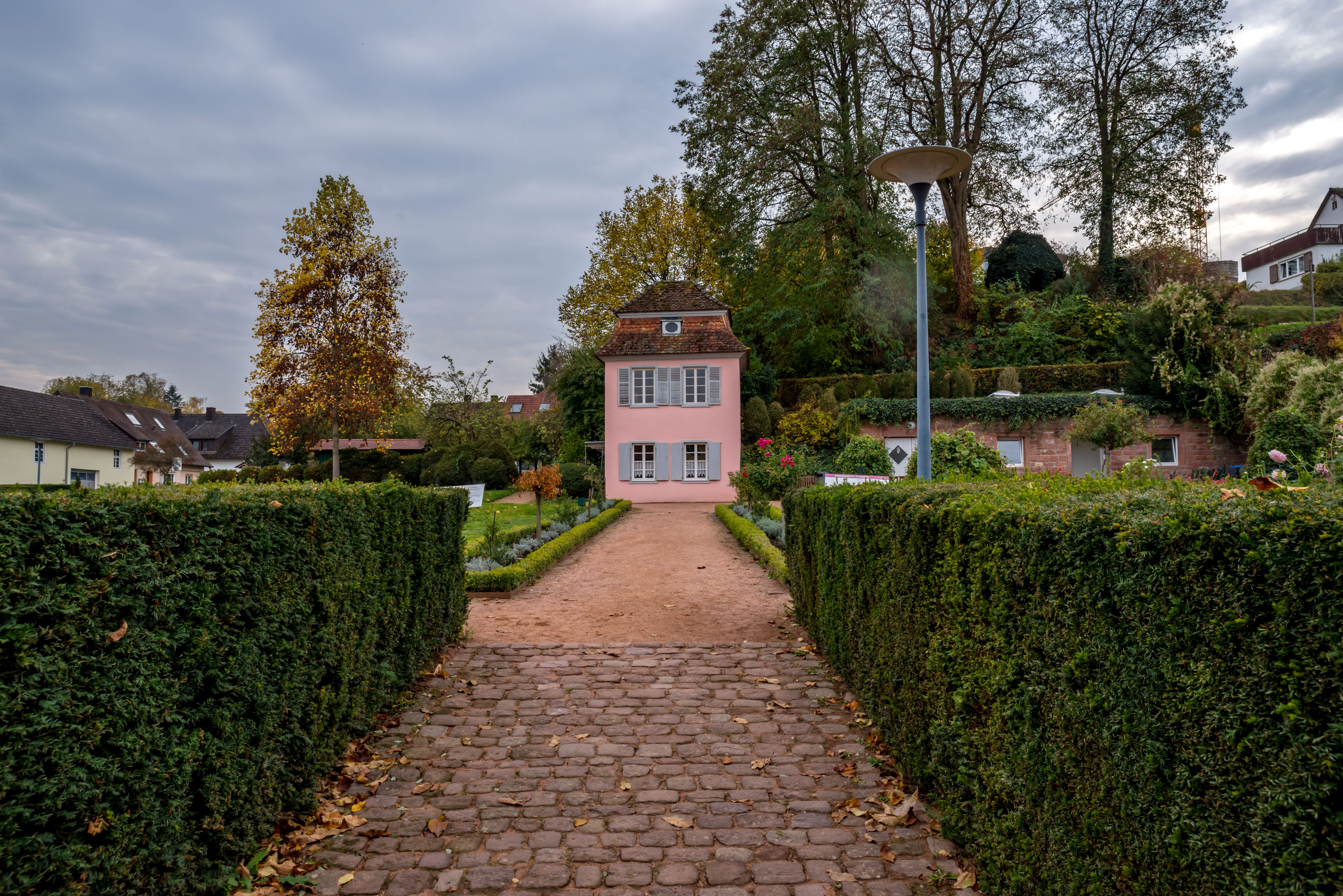 Bilder aus dem Prinzengarten in Ettenheim November